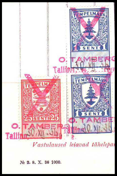 Фискальные марки Эстонии четвёртого выпуска на документе